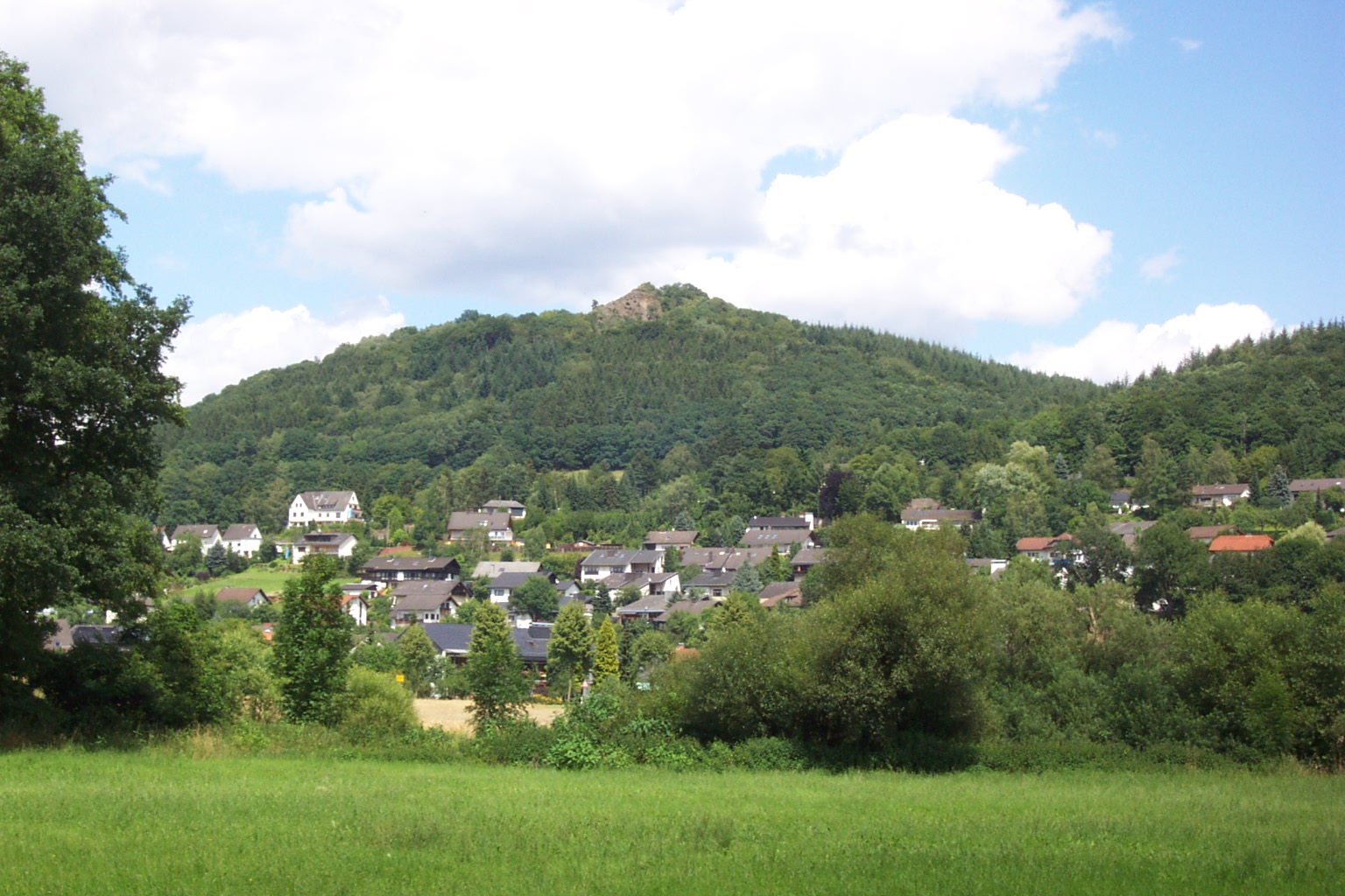 Roßbach (Wied), Berg Roßbacher Häubchen, ehemaliger Basaltsteinbruch